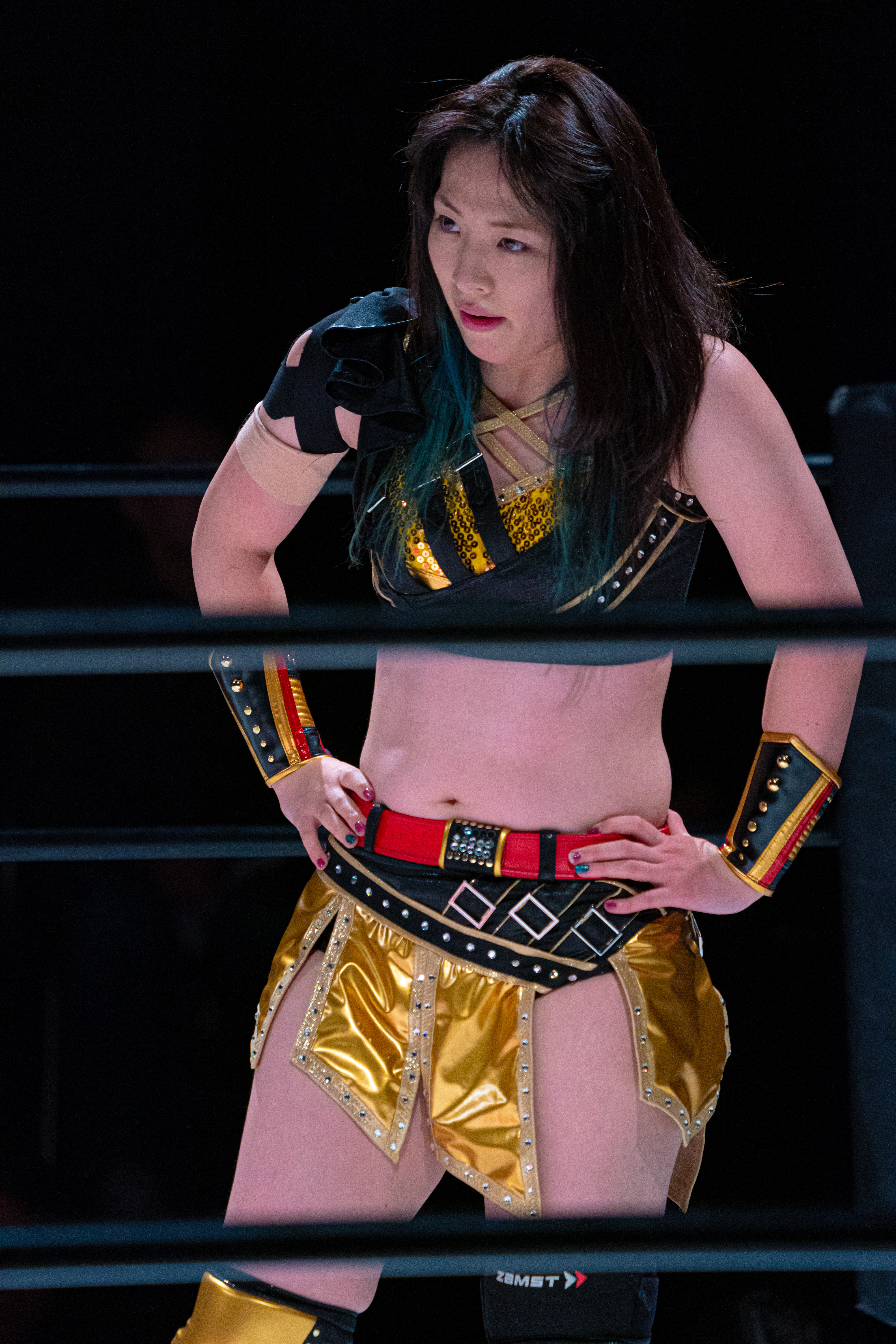 2020.01.23 新木場 1st RING